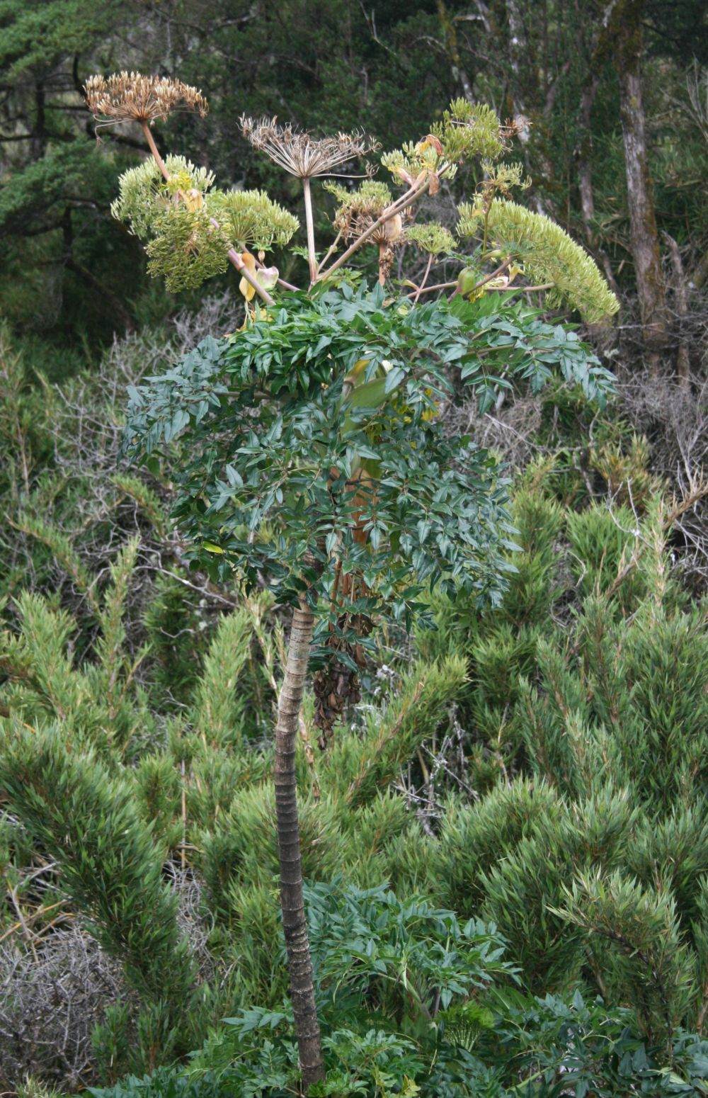 Myrrhidendron donnellsmithii, Doldenblütler (Apiaceae) - Costa Rica: Prov. Cartago/San José, Cordillera de Talamanca, Carretera Interamericana N Cerro de la Muerte, km 86-87, 3150-3200 m